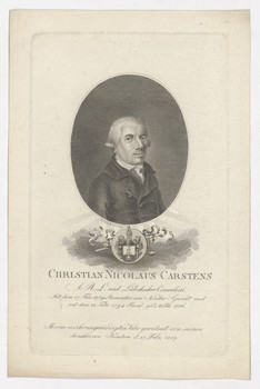 Porträt Christian Nicolaus Carstens (* 15. Februar 1736 in Lübeck; † 15. Dezember 1819 ebenda), Jurist in Lübeck